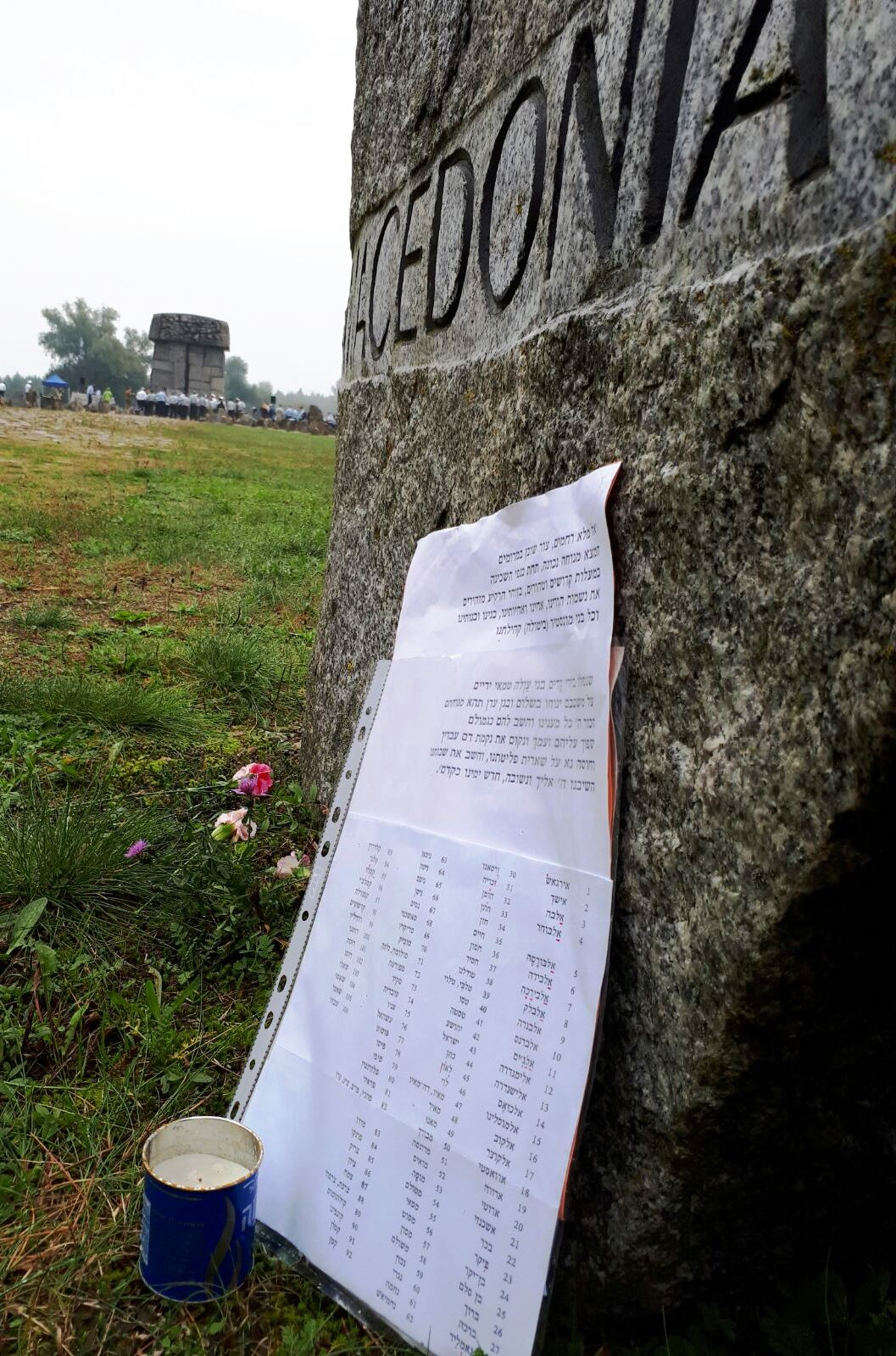 דף שהונח בטרבלינקה על ידי קציני צה"ל ובו רשימת הנרצחים מביטולה